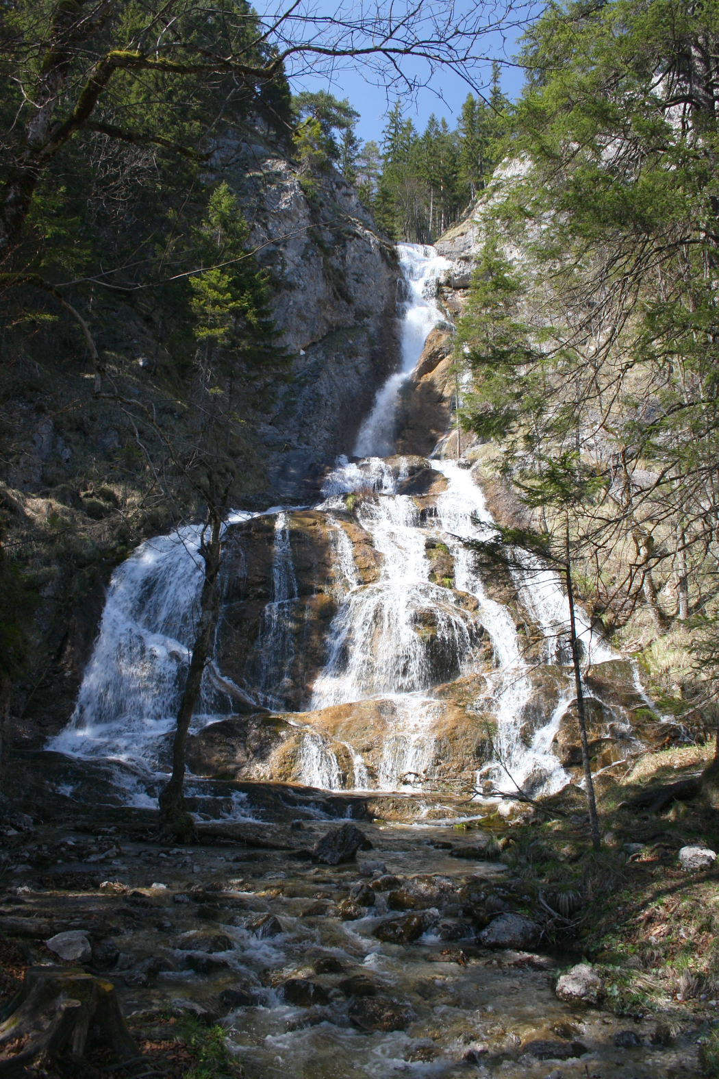 Der Schleierbach (Schleierfall) bei der Einmündung in den Ötscherbach.